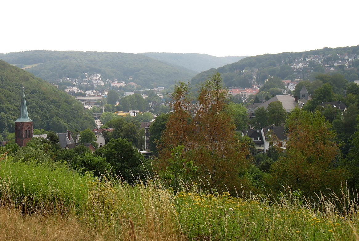 Ennepetal-Milspe vom Berg oberhalb des Bahnhofes fotografiert. Das gelbe Gebäude in der Mitte ist das „Haus Ennepetal“.